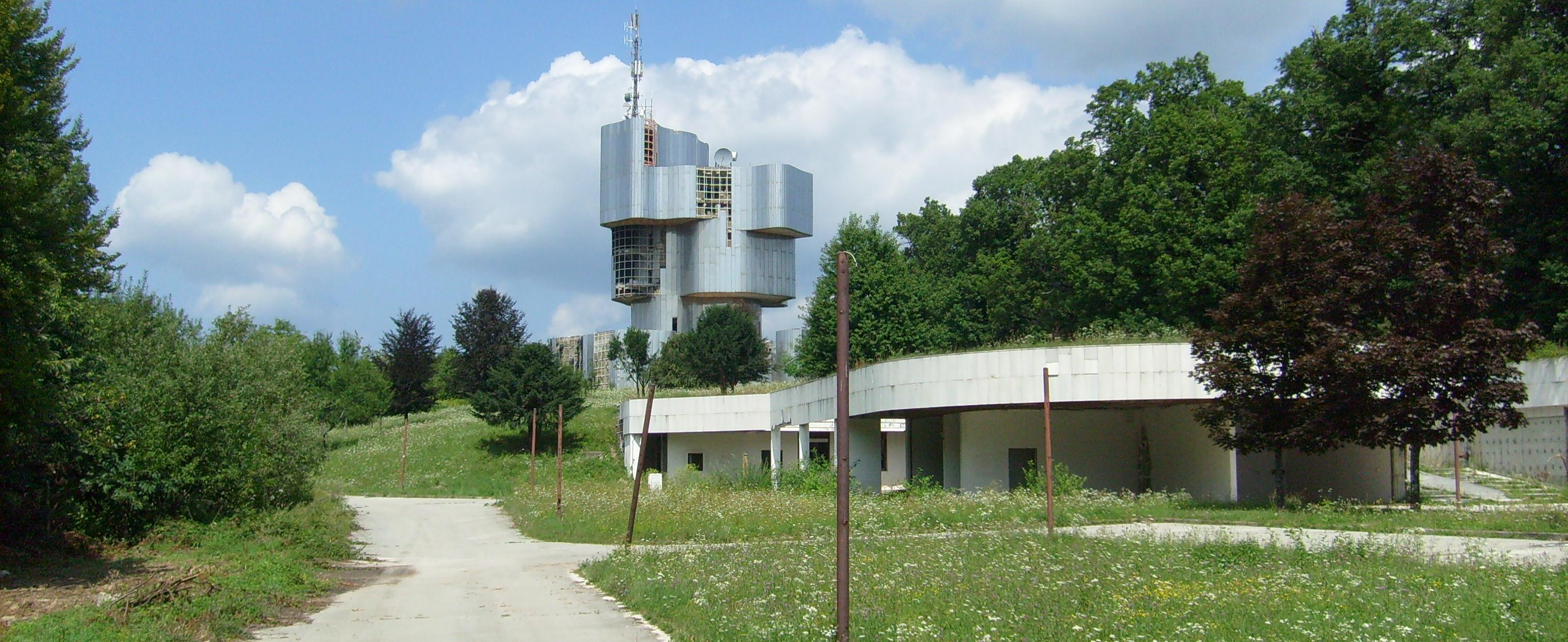 19.08.2010. _ Petrova Gora